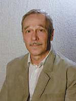 Srpski (latinica): Dr Antun Malenica, profesor emeritus, Pravni fakultet u Novom Sadu